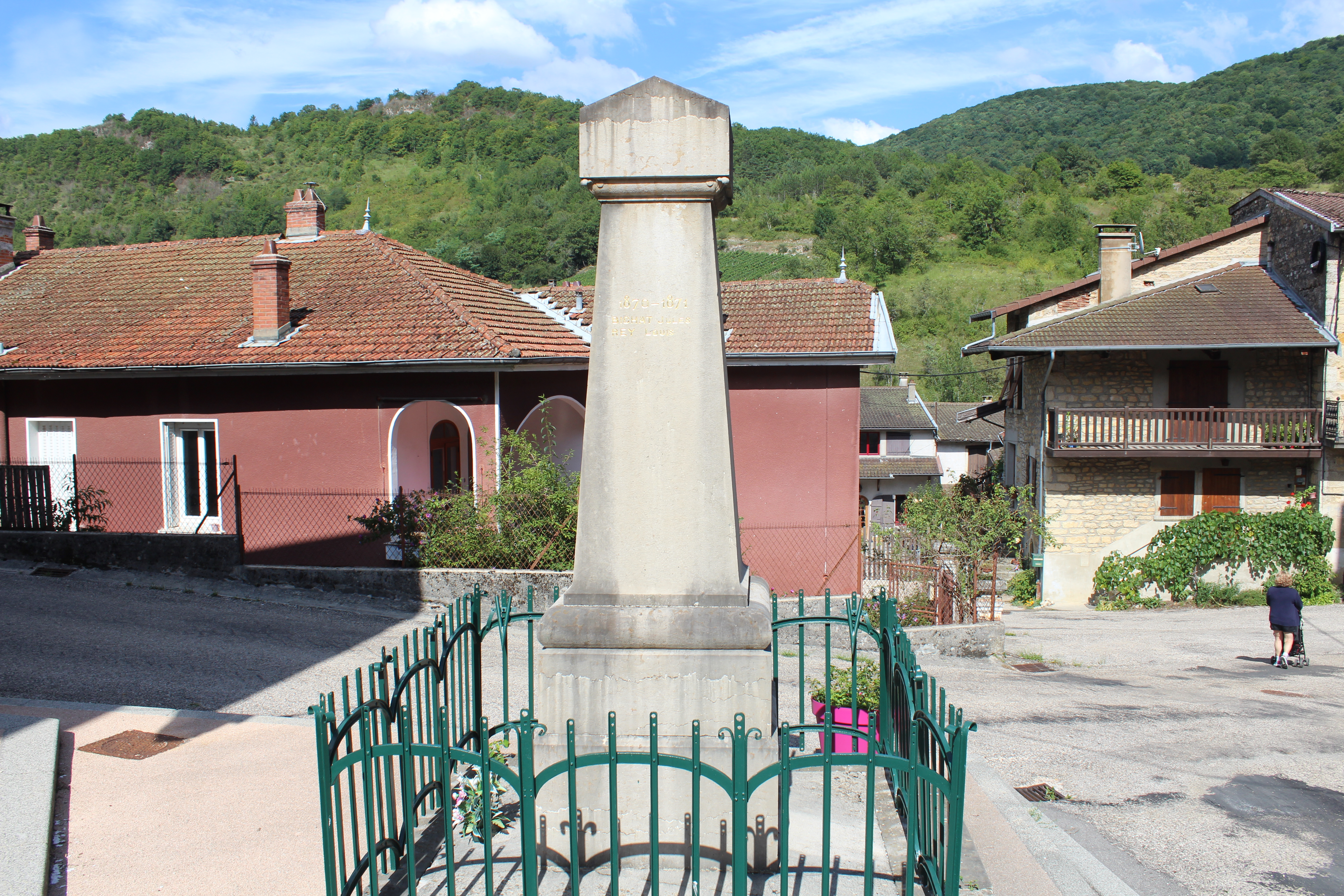 Monument aux morts de L'Abergement-de-Varey.